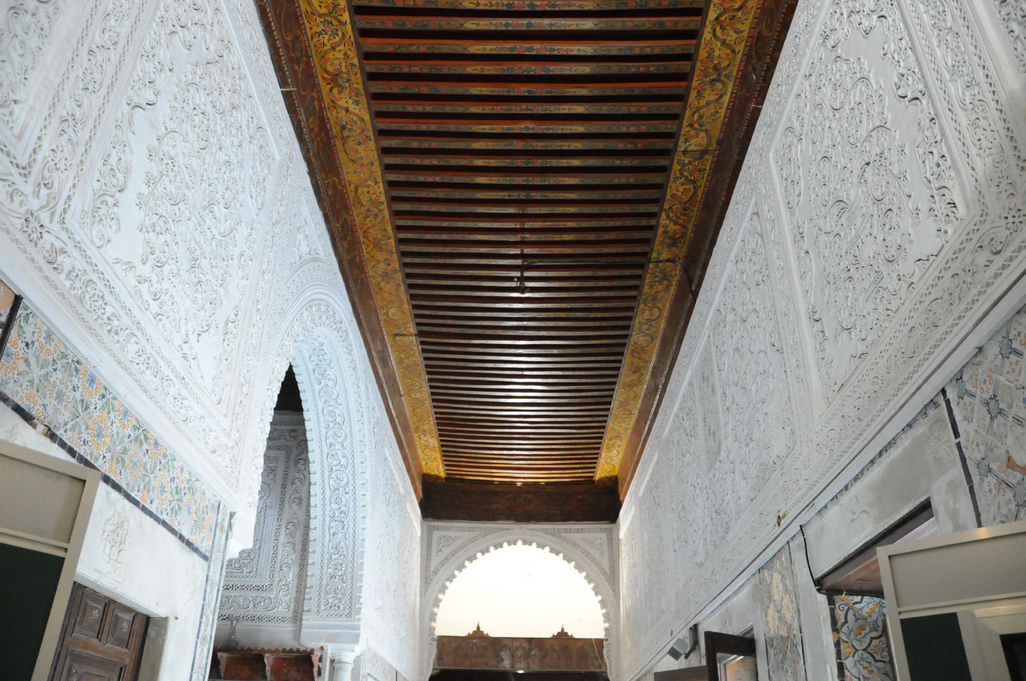 Dar Ben Abdallah dans la Médina de Tunis, Tunis, Tunisie